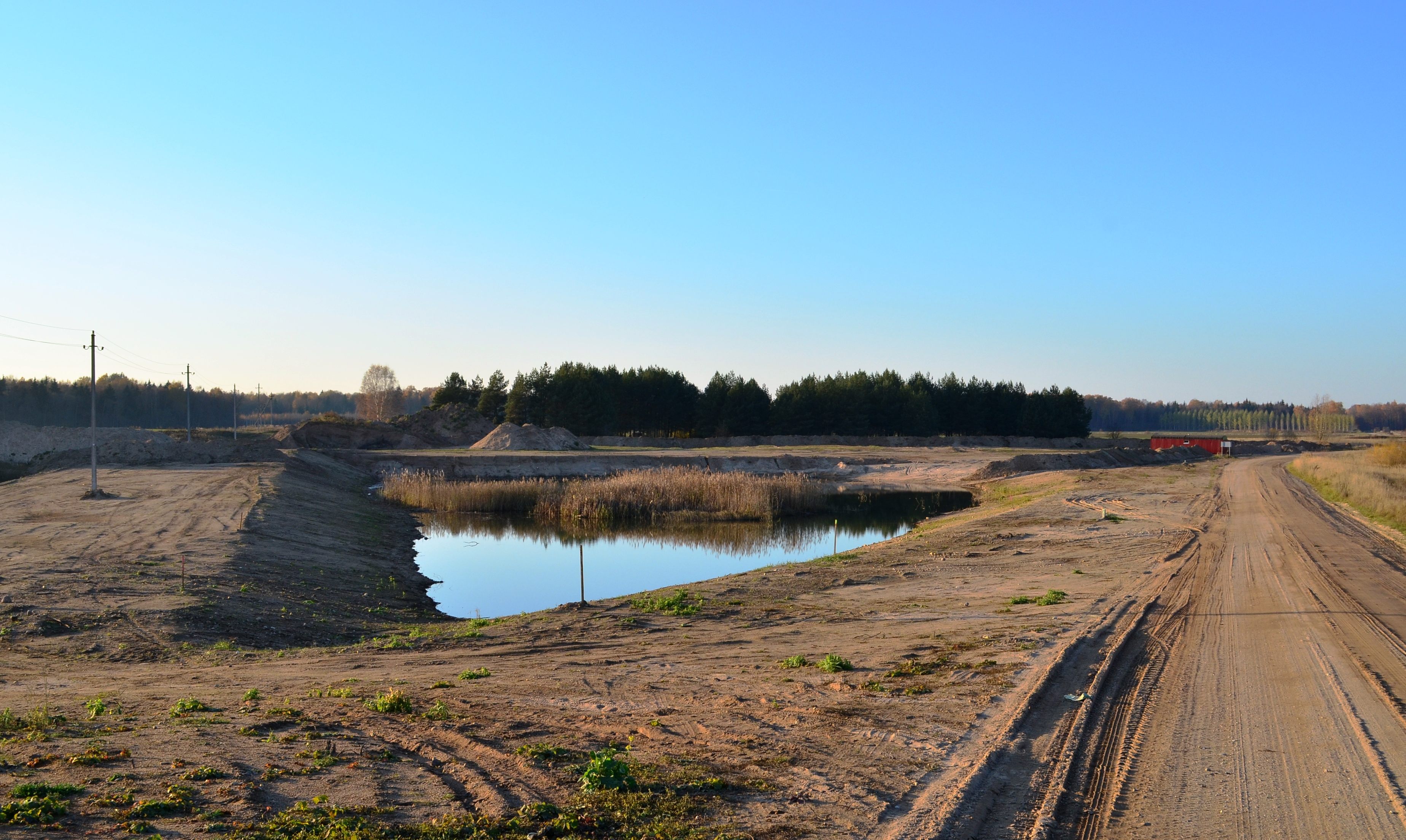 Milžemių žvyro karjeras, Kėdainių raj.